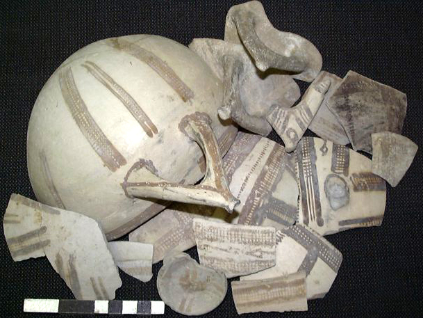 Tell Abu Hawam Excavation 2001 by Haifa University Israel. The head of the expedition was Professor Michal Artzy. White Slip ware. משלחת חפירות ארכאולוגיות בתל אבו הואם שהתקיימה בשנת 2001 ע"י אוניברסיטת חיפה , החוג לציוויליזציות ימיות בראשות פרופ' מיכל ארצי. התל נמצא במפרץ חיפה והיה עיר נמל עתיקה באזור המפרץ מתקופת הברונזה המאוחרת ועד התקופה ההליניסטית. הכלי הוא כלי קיפרי המיובא מקפריסין ממשפחת מחופה לבן This work is free and may be used by anyone for any purpose. If you wish to use this content, you do not need to request permission as long as you follow any licensing requirements mentioned on this page.